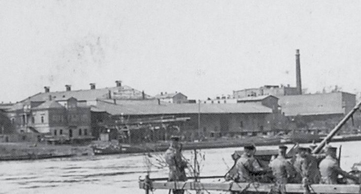 Ausschnitt aus einer Fotografie von 1913, Der Ausschnitt zeigt die Gerloffsche Villa auf der Gerloffschen Werft in Magdeburg-Westerhüsen an der Elbe.